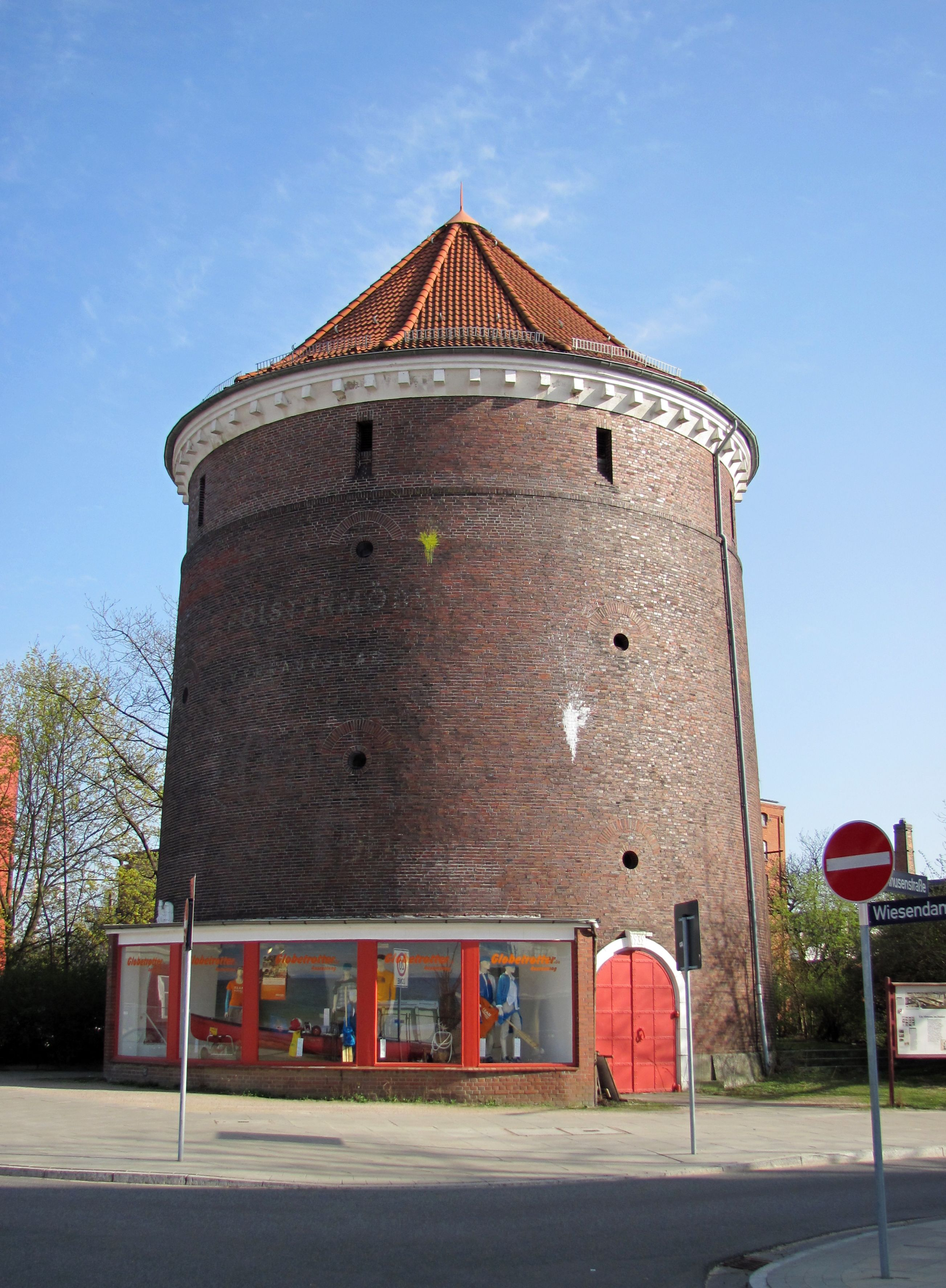 Rundturm-Bunker Wiesendamm 7, Barmbek-Nord, Hamburg This is the photograph of an architectural monument. It is part of the list of cultural monuments of Hamburg, no. 1368